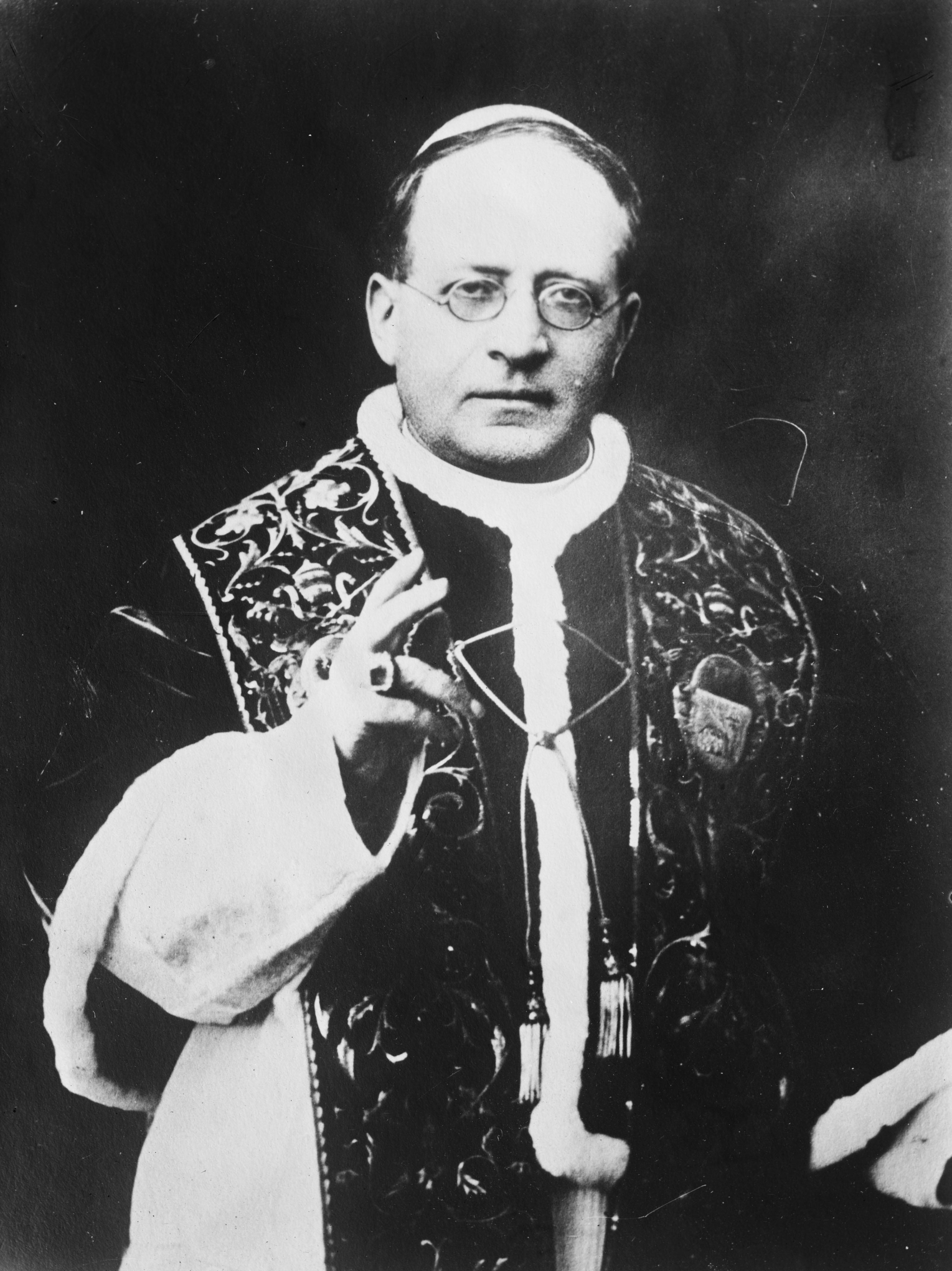 Pope Pius XI